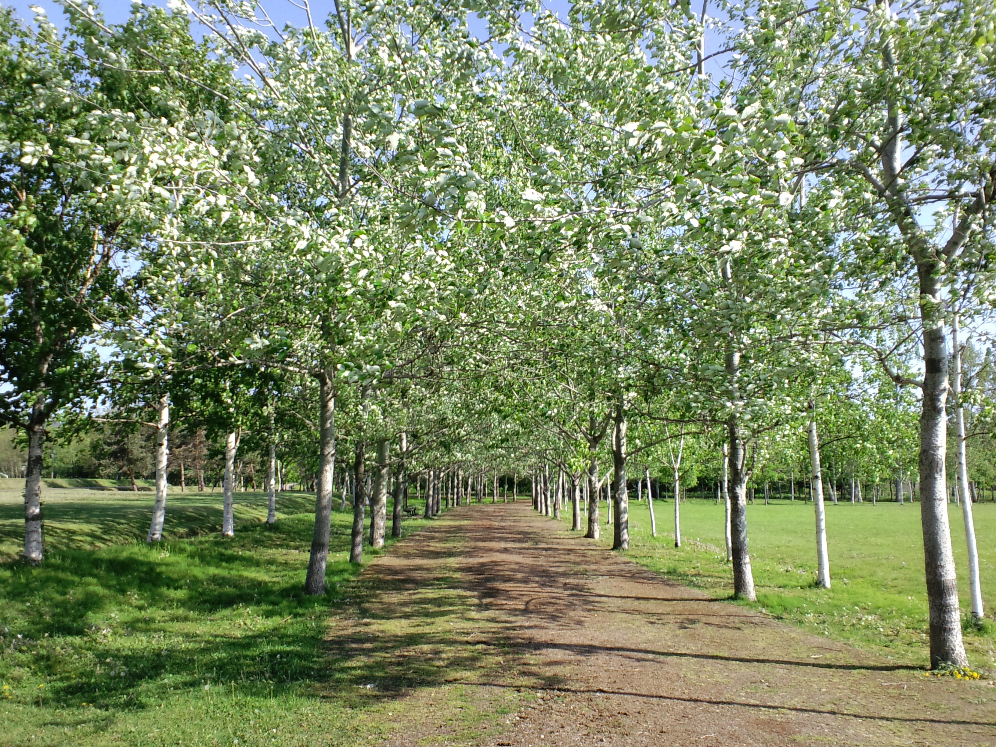 東山公園のポプラ（北京毛白楊）並木